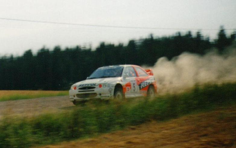 Carlos Sainz Ouninpohjan erikoiskokeella Nest Rally Finlandissa 1997